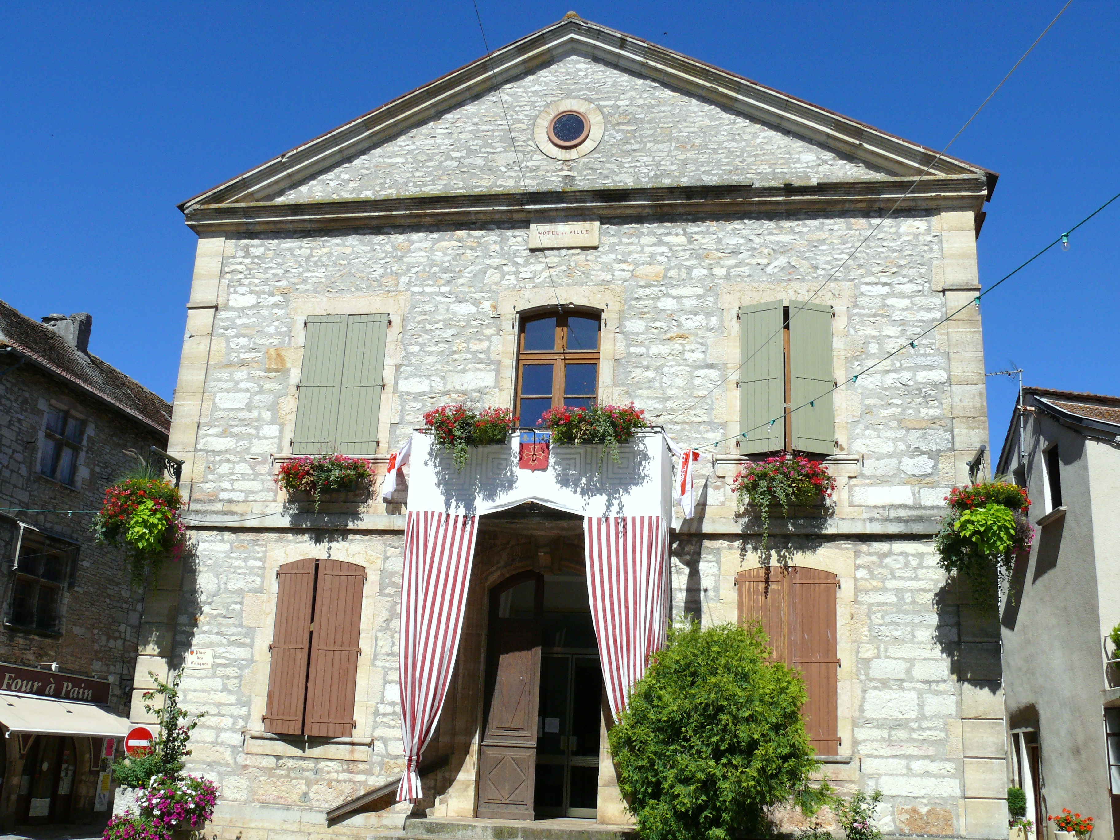 Villeneuve (Aveyron) - Hôtel de ville